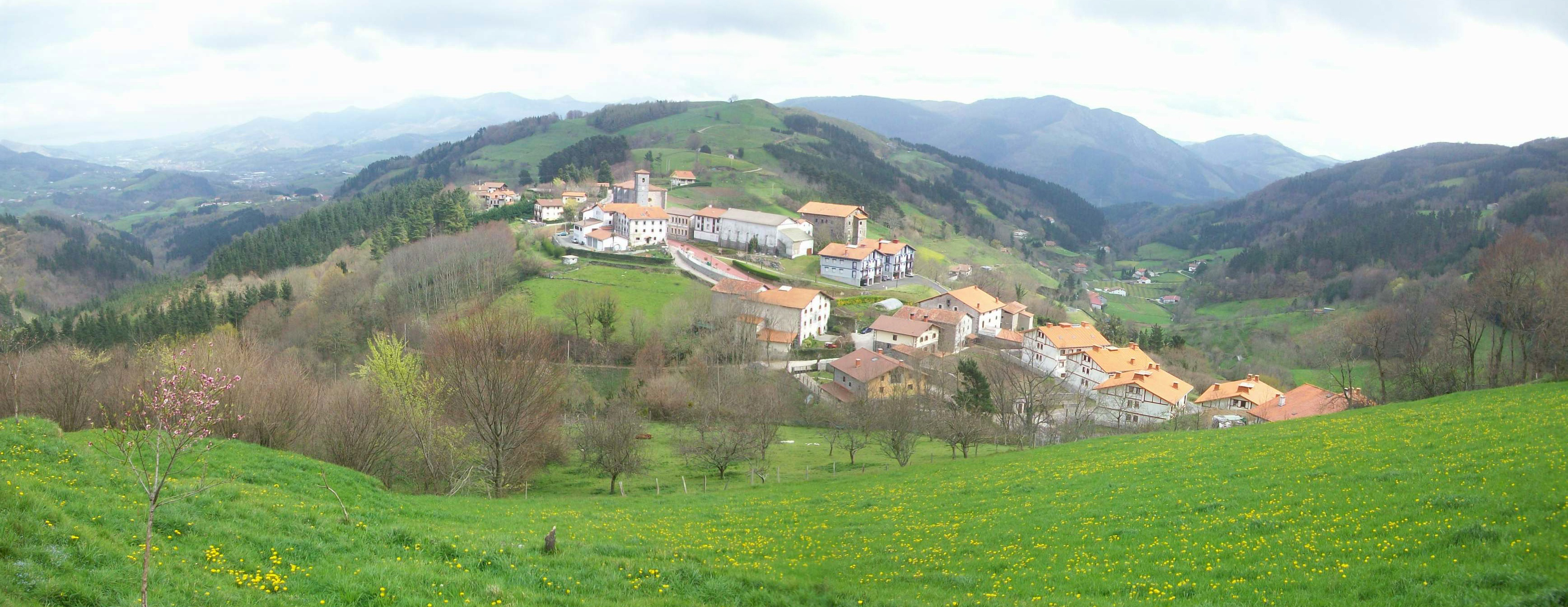 Alkiza, Tolosaldea. Gipuzkoa, Euskal Herria. Alkiza, Tolosaldea. Guipuscoa, Basque Country.